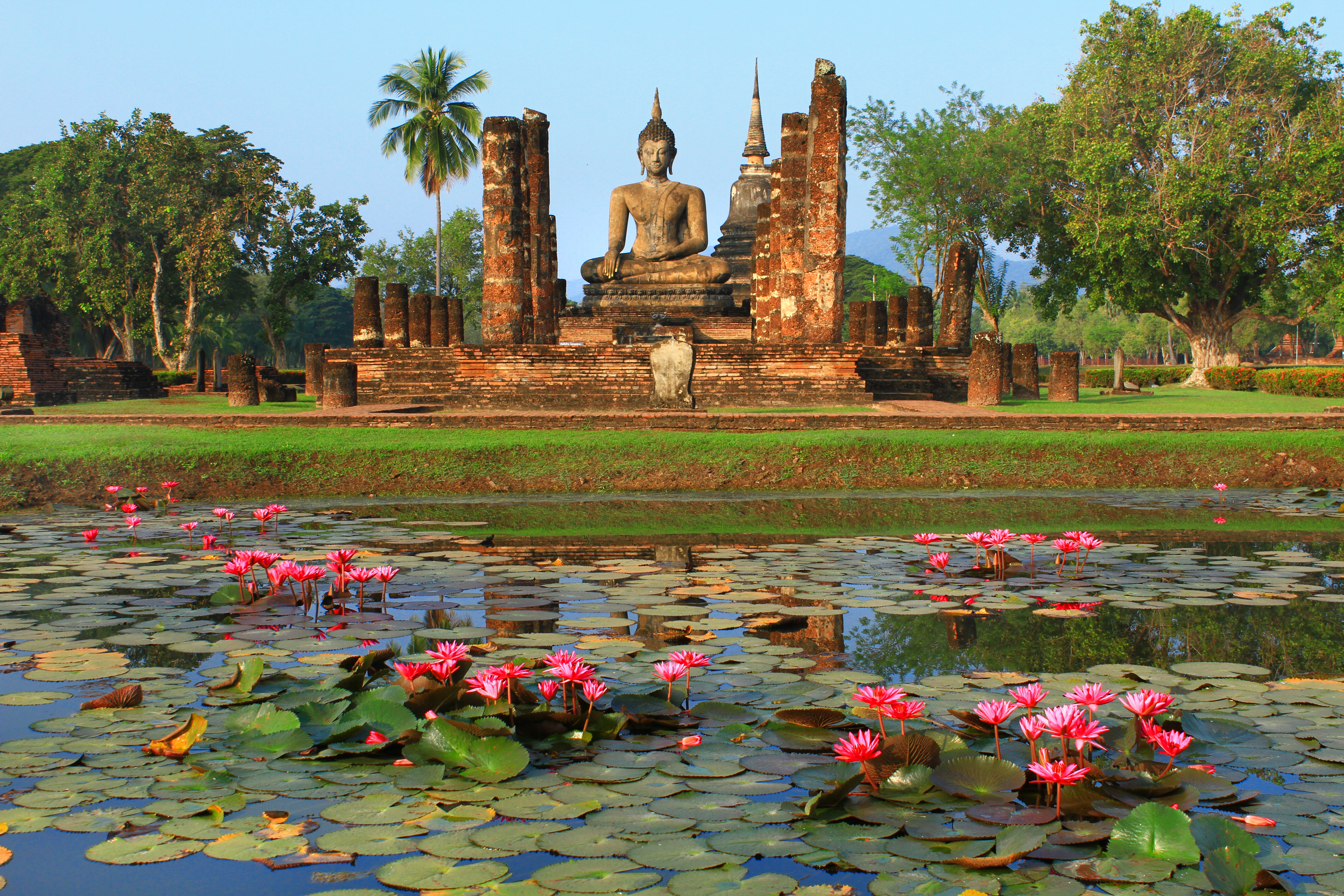 โบราณที่ทรงคุณค่าและงดงามที่อยู่กับประเทศไทยมาตั้งแต่อดีตจนถึงปัจจุบัน